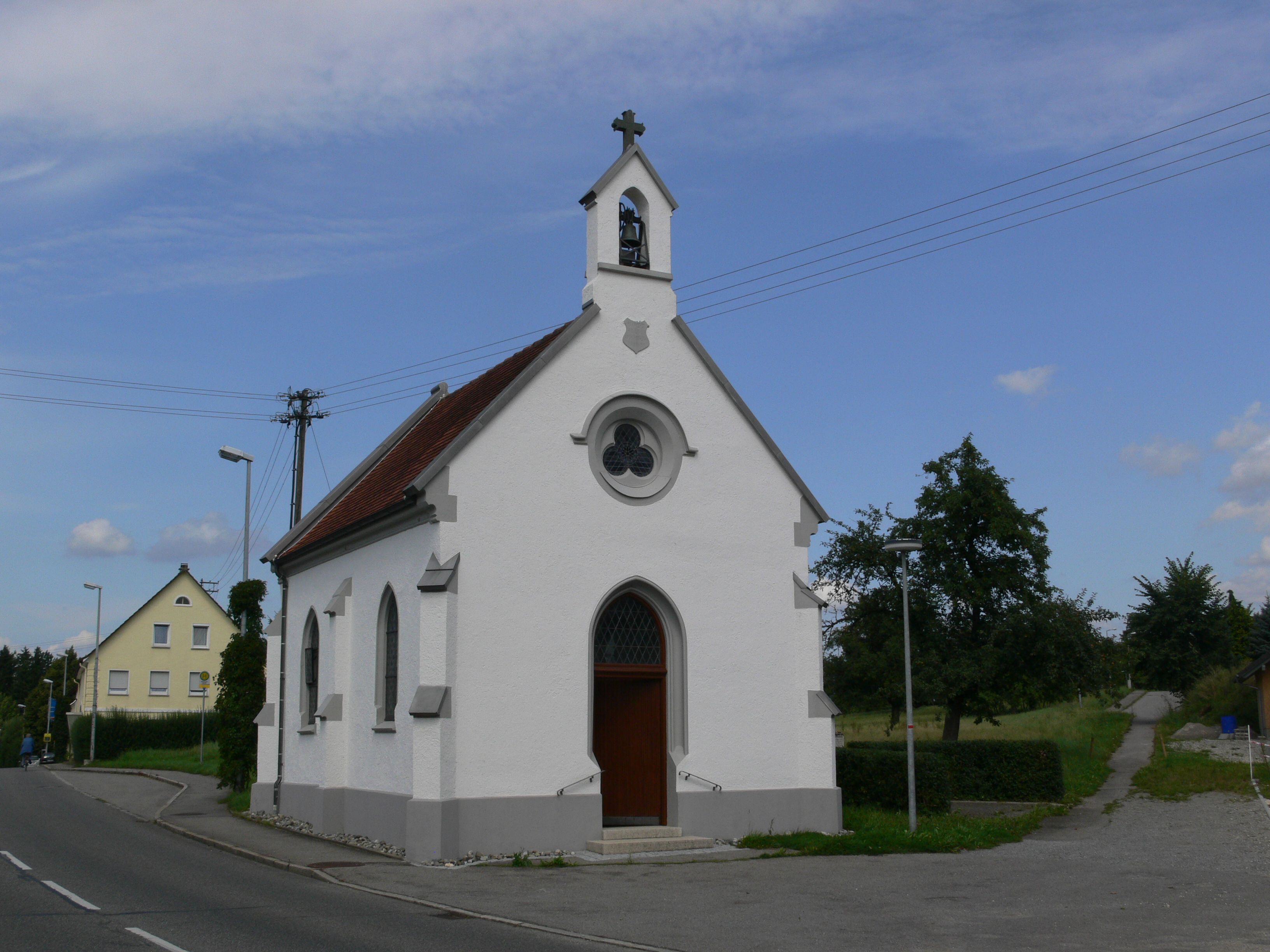 Kapelle St. Georg, Zollenreute, Stadt Aulendorf Außenansicht